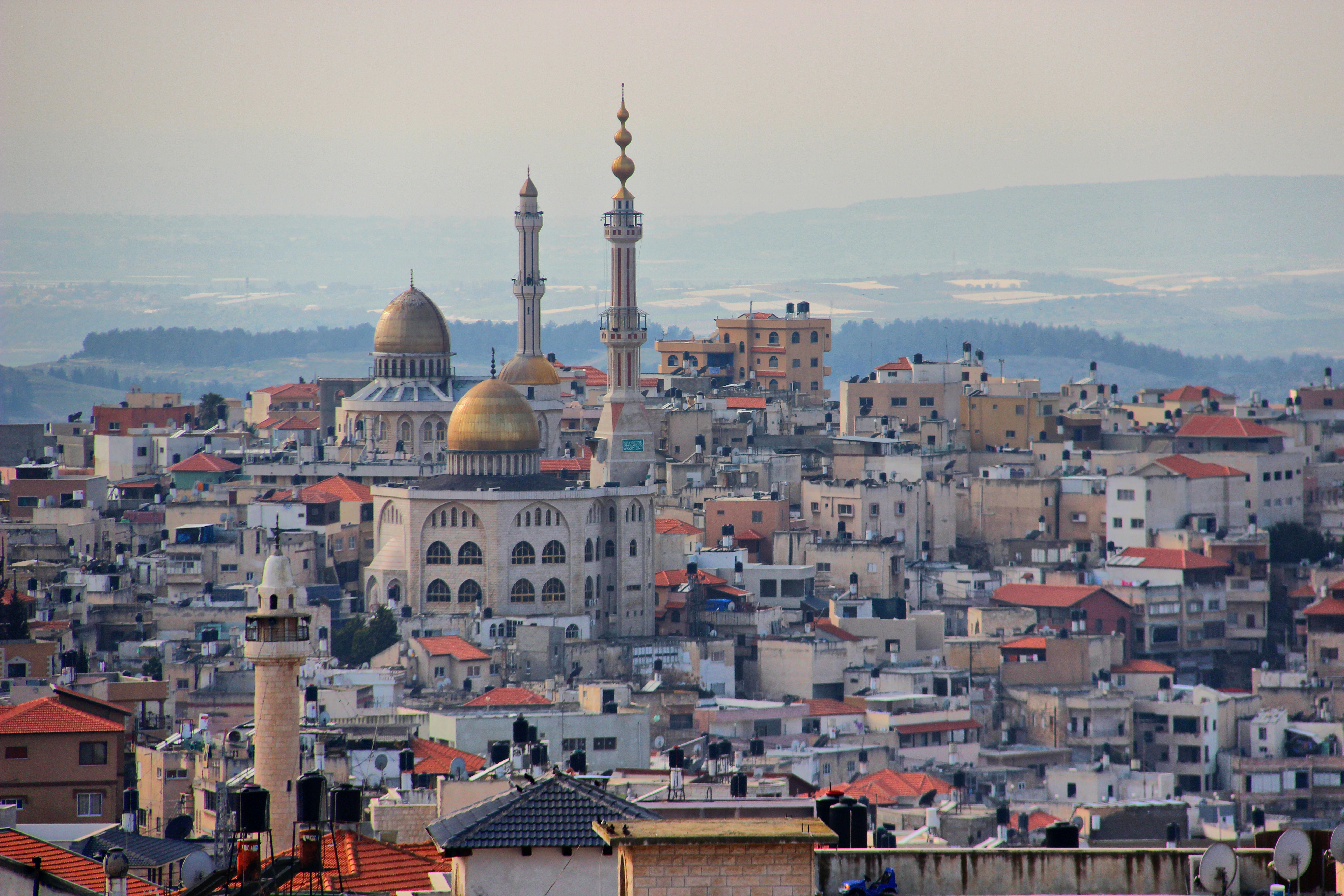 مدينة أُمّ الفحم الفلسطينيّة